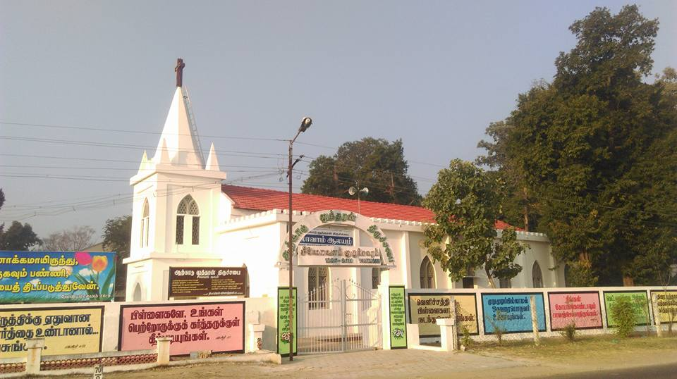 ஆற்காடு லுத்தரன் திருச்சபை திருக்கோவிலுர் முன் தோற்றம்